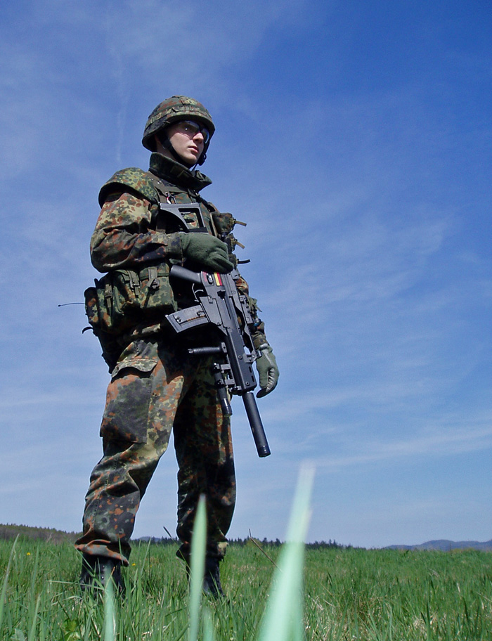 hráč airsoftu napodobující BW